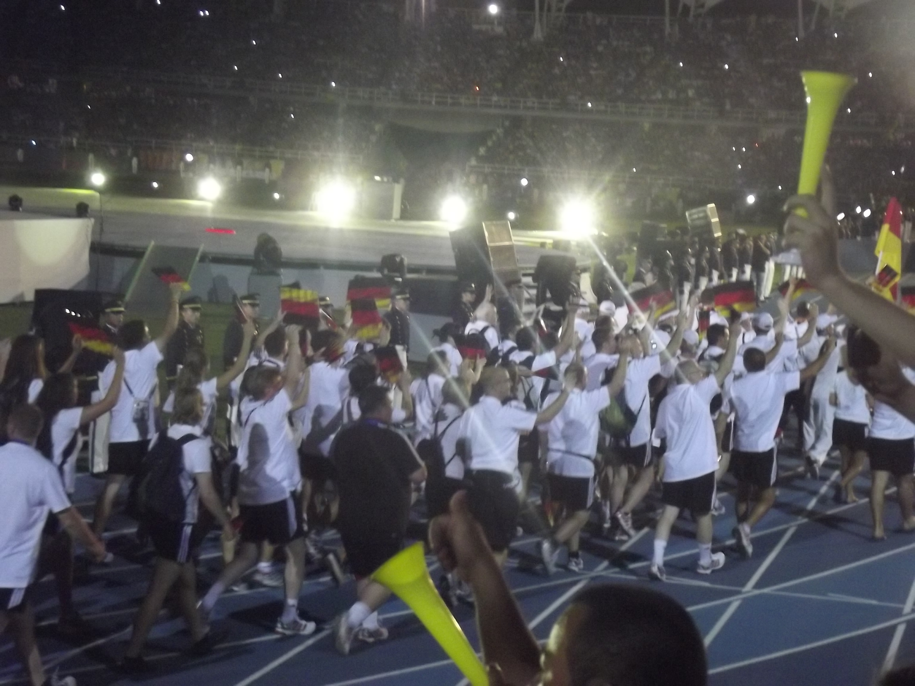 Delegaciones nacionales que participaron en los Juegos Mundiales Cali 2013Esperanto: Naciaj delegitaroj kiuj partoprenis dum la Mondaj Ludoj Kalio 2013